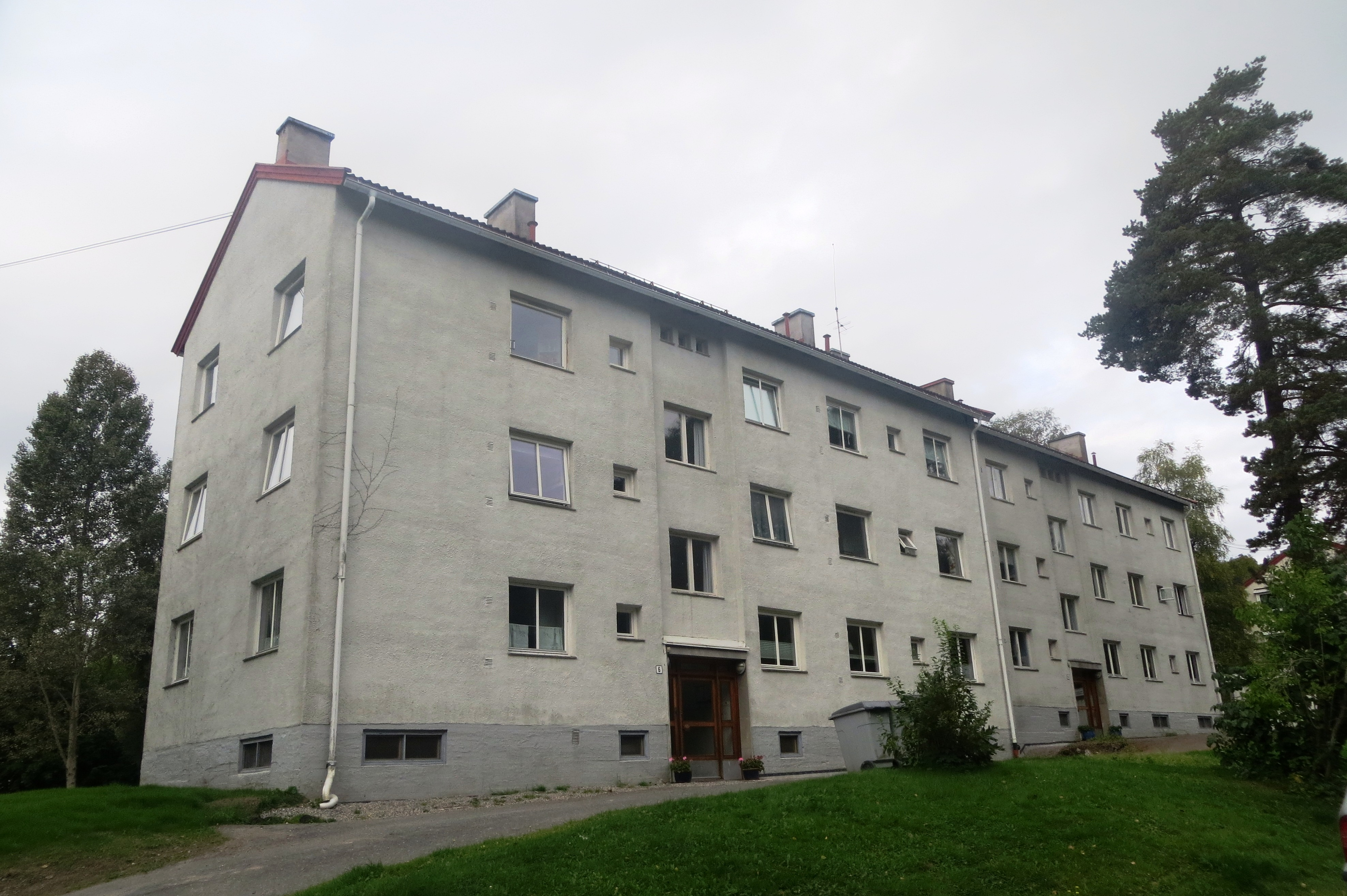 Gaupefaret borettslag på Gressbanen / Slemdal, i bydel vestre Aker (Oslo). Hele boligområdet Gaupefaret-Vassfaret har lokalt listeført bygningsvern.